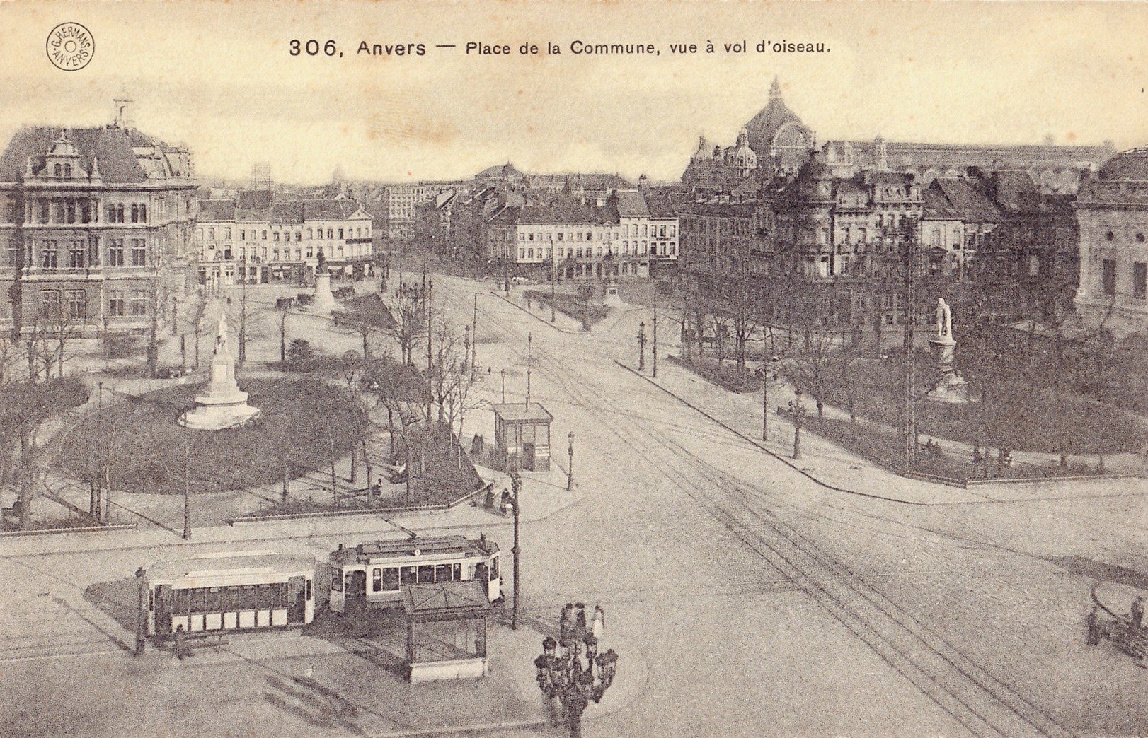 Carte postale ancienne éditée par G. Hermans à Anvers : ANVERS - Place de la Commune, vue à vol d'Oiseau